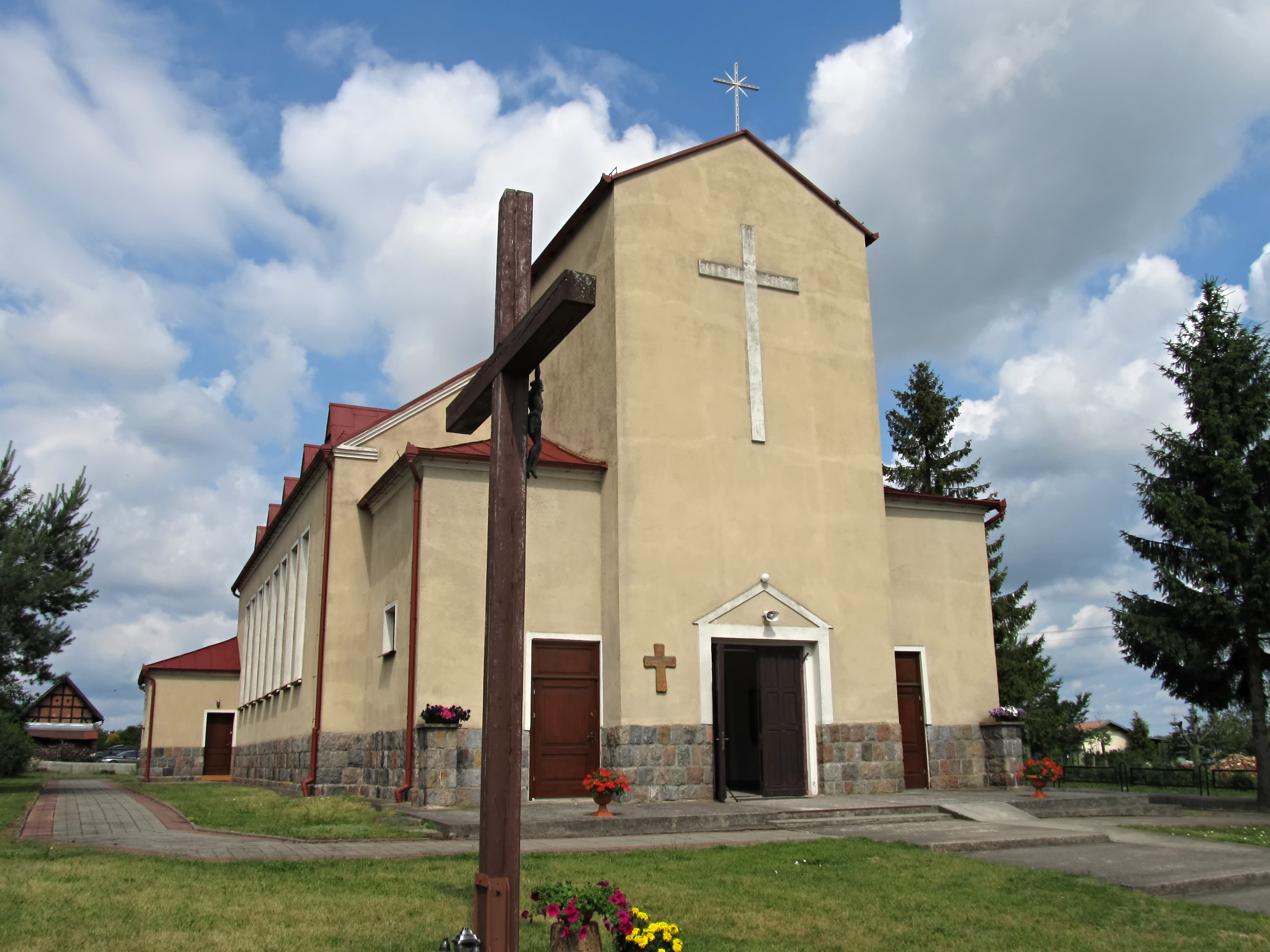 Konarzyny 69 - rzymskokatolicki kościół parafialny pw. św. Antoniego Padewskiego (pierwotnie z 1936, wysadzony w powietrze przez Niemców 6 marca 1945, odbudowany w latach 1956-1960)